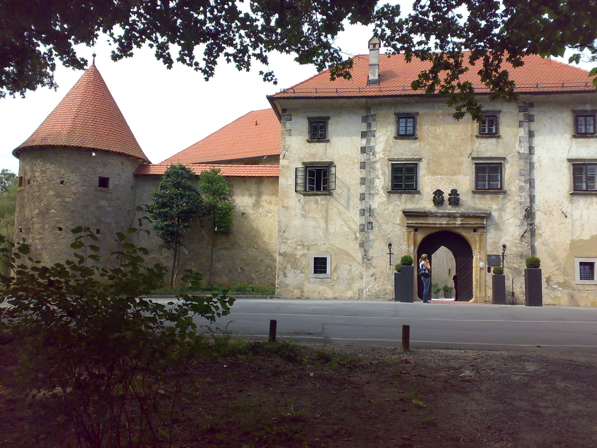 Castle Otočec - Slovenia